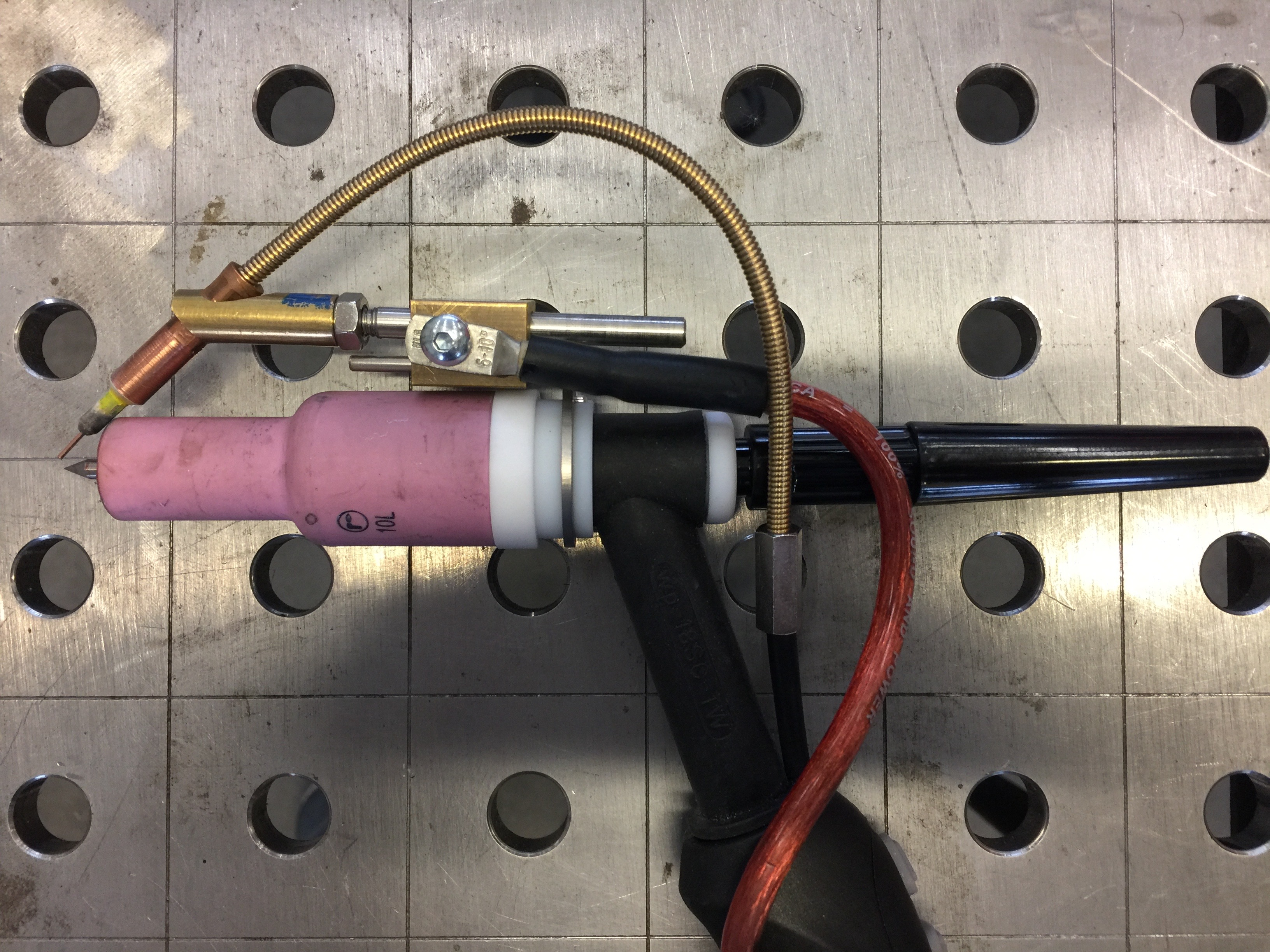 TIP TIG Schweißbrenner